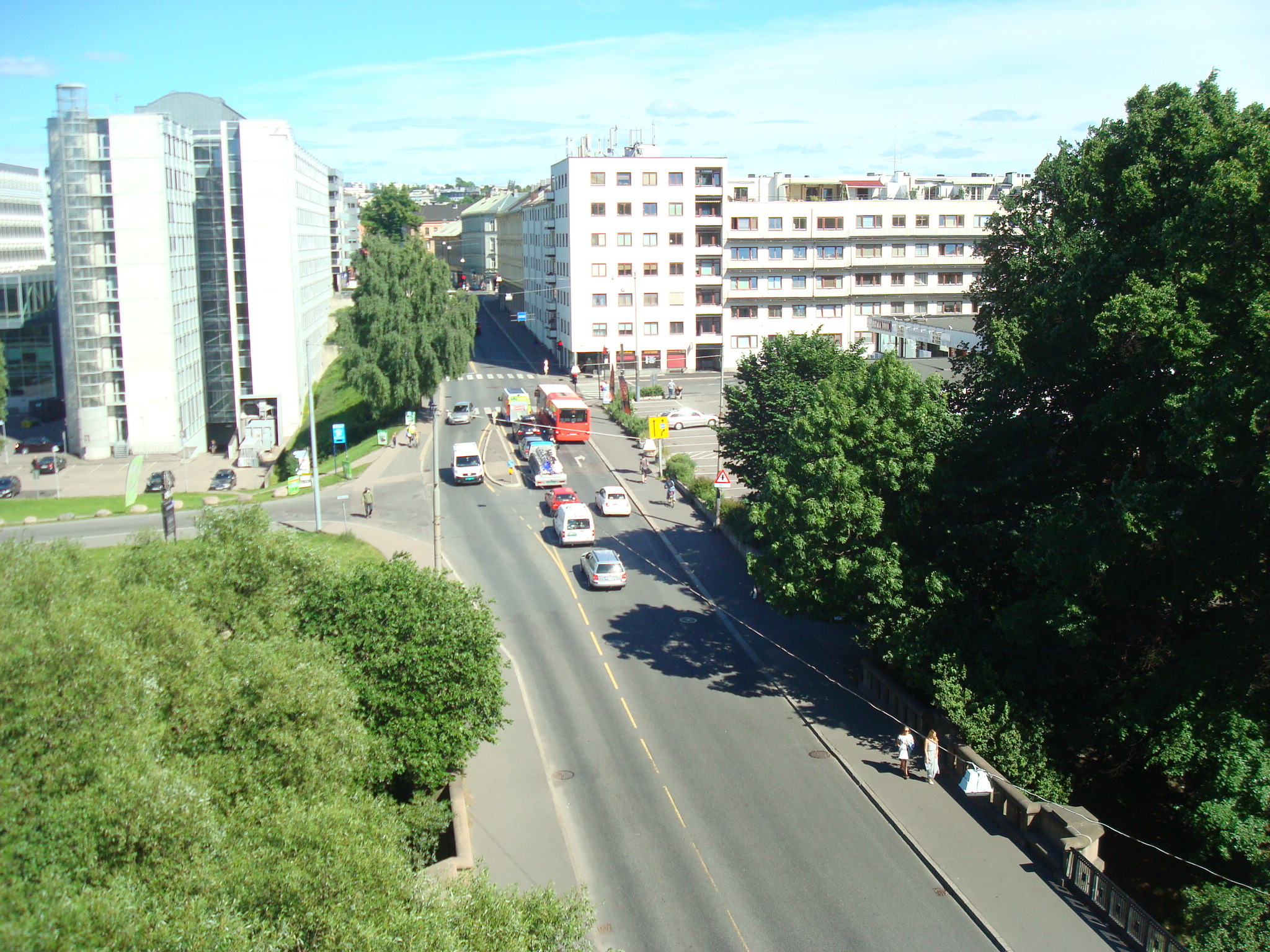 Sannergata i Oslo. Utsyn med Sannerbrua i forgrunn og østover.